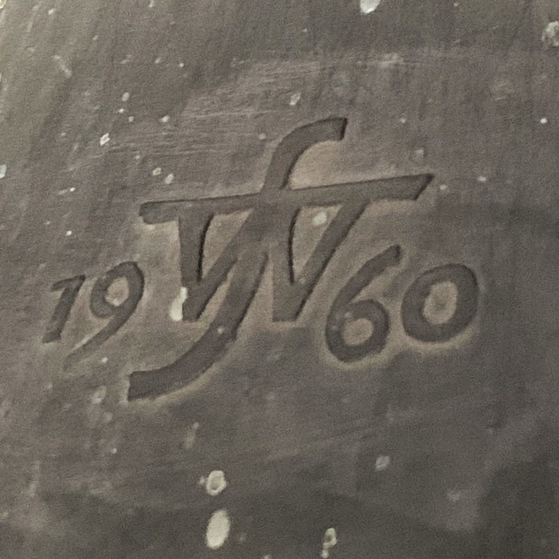 Gießerzeichen F. W. Schilling (Heidelberg) mit Datum 1960 auf der Nikolaus Glocke in St. Martin Lorch. Sie soll die schwerste b° Glocke (4182 Kg / Ø 1815 mm) sein, die von Schilling gegossen wurde.